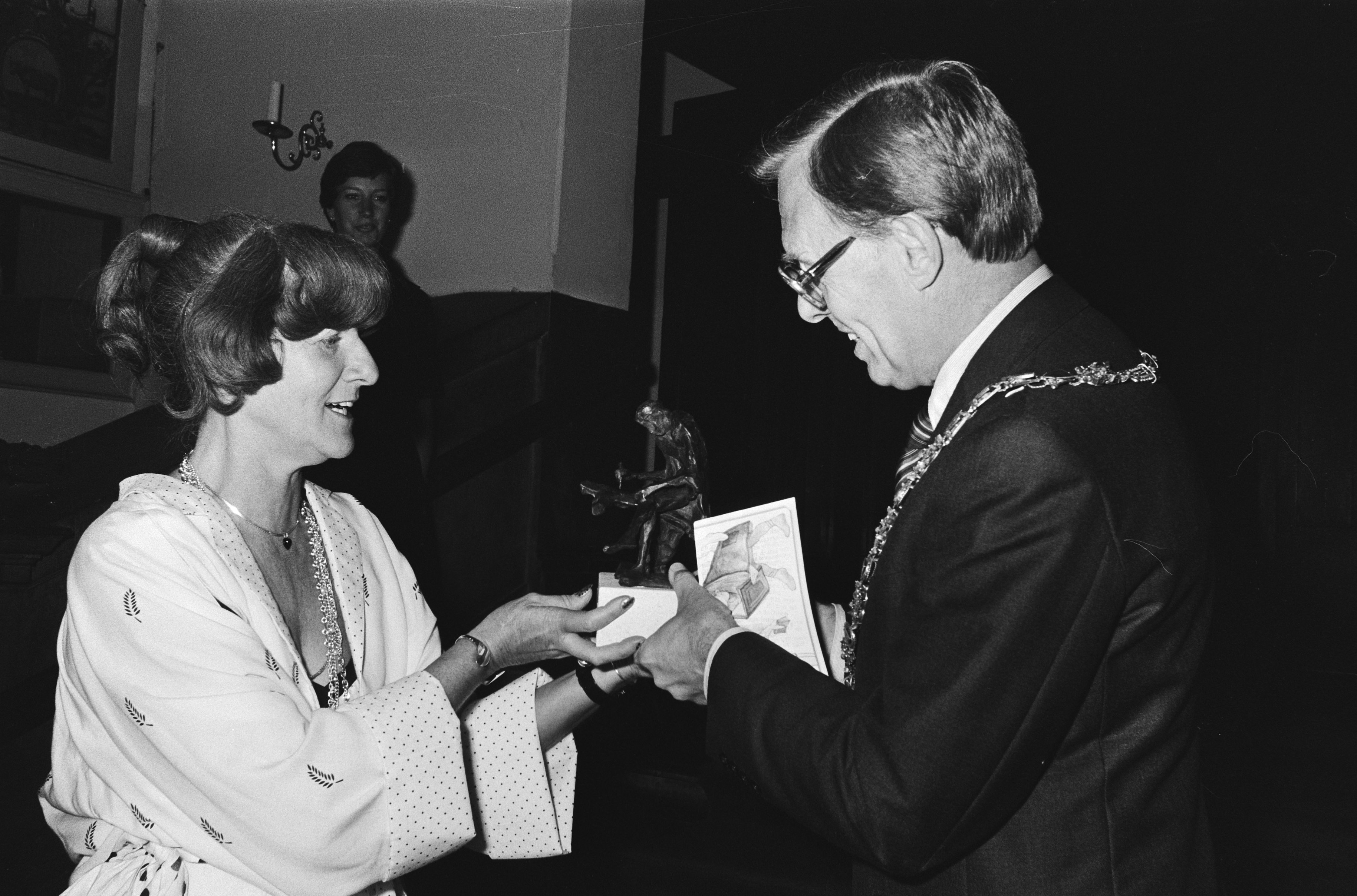 Collectie / Archief : Fotocollectie Anefo Reportage / Serie : Kinderboekenschrijfster Miep Diekmann ontvangt de Laurens Janszoon Costerprijs Beschrijving : Miep Diekmann ontvangt de prijs uit handen van burgemeester Reehorst (Haarlem) Datum : 7 juni 1979 Locatie : Haarlem, Noord-Holland Trefwoorden : burgemeesters, literatuur, prijsuitreikingen, schrijvers Persoonsnaam : Diekmann, Miep, Reehorst, Jan Fotograaf : Suyk, Koen / Anefo Auteursrechthebbende : Nationaal Archief Materiaalsoort : Negatief (zwart/wit) Nummer archiefinventaris : bekijk toegang 2.24.01.05 Bestanddeelnummer : 930-3026 Reacties Geplaatst door Boekenwurm op 10 juli 2017 - 19:07. Miep Diekmann (1925-2017)